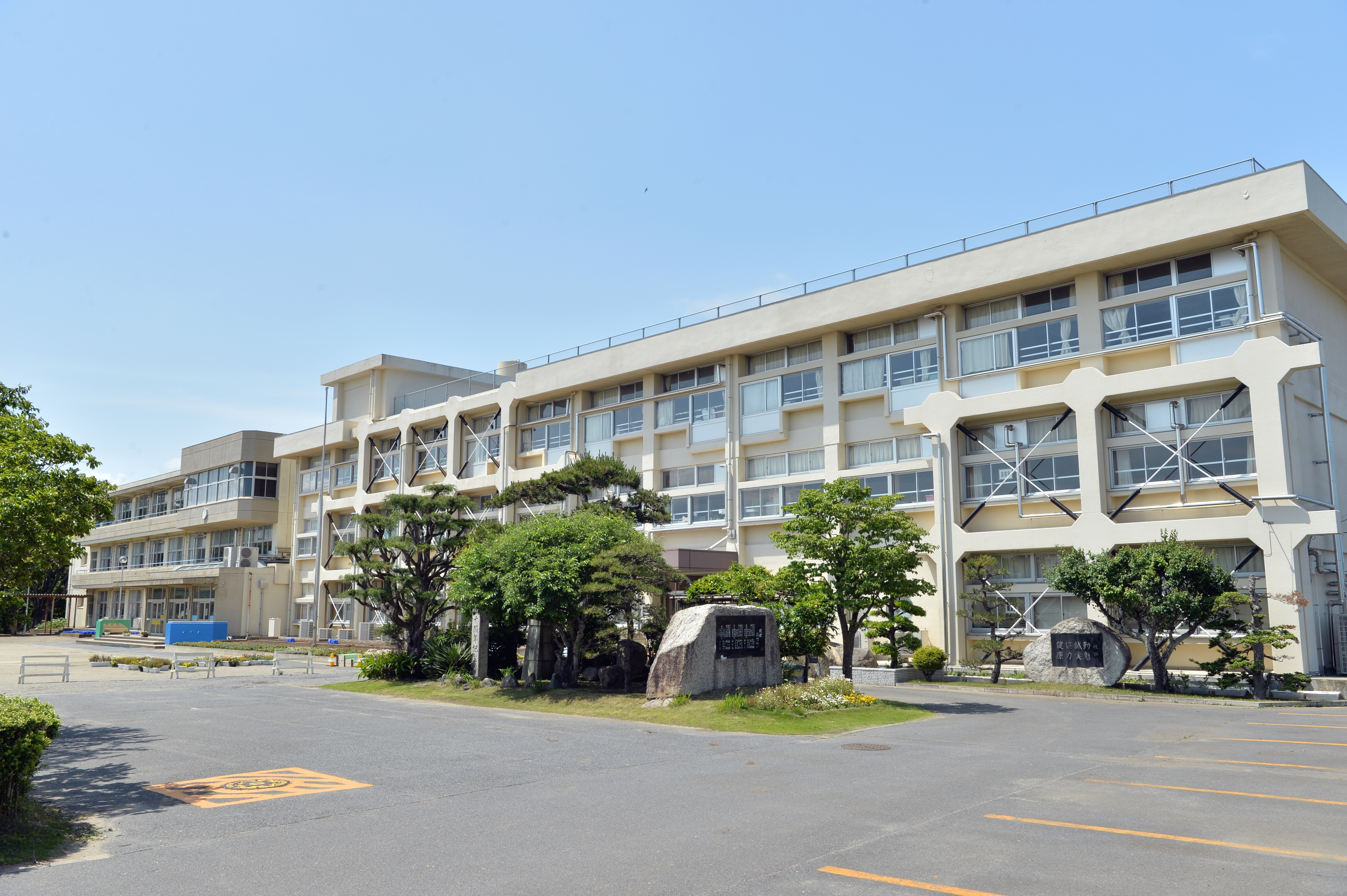 茨城県ひたちなか市馬渡に所在する、ひたちなか市立前渡小学校の校舎。